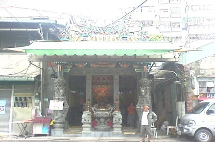 台北大橋福德廟位於台灣台北市迪化街2段，為主祀福德正神之道教廟宇。該建物興建於1777年